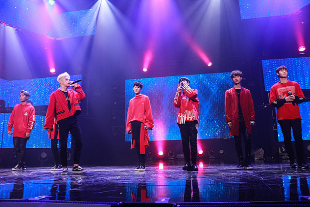 09월 26일 뮤콘 쇼케이스 MUCON Showcase 엠브이피(MVP)